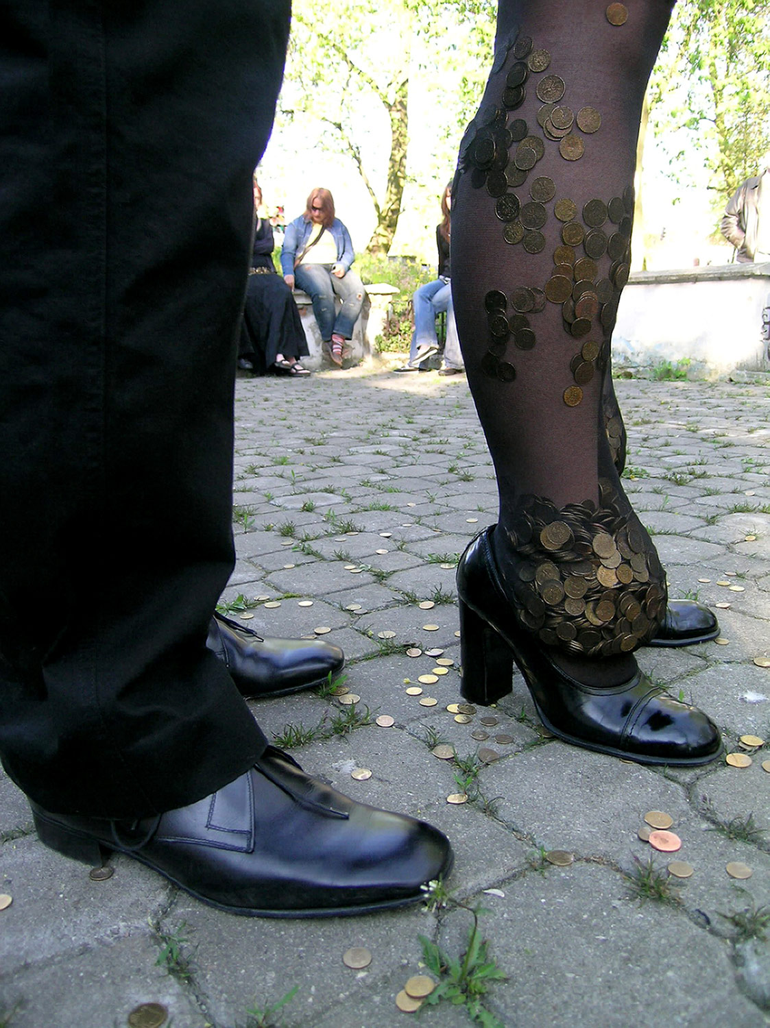 Grupa Bergamot - Performance Organic life, 2007, “Europe-Asia. Mediations”, Poznań